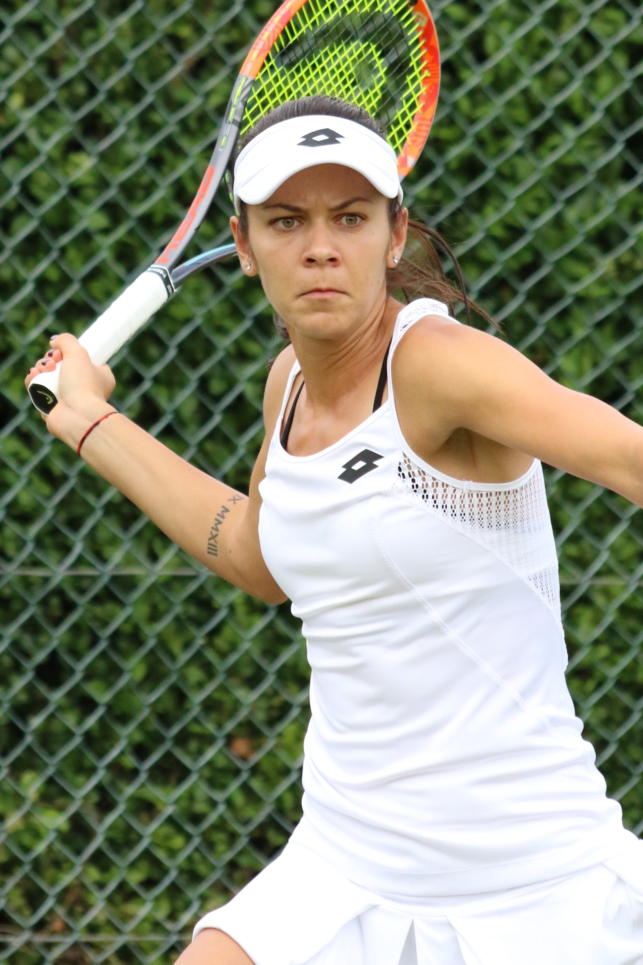 Mitu WMQ16 (11)